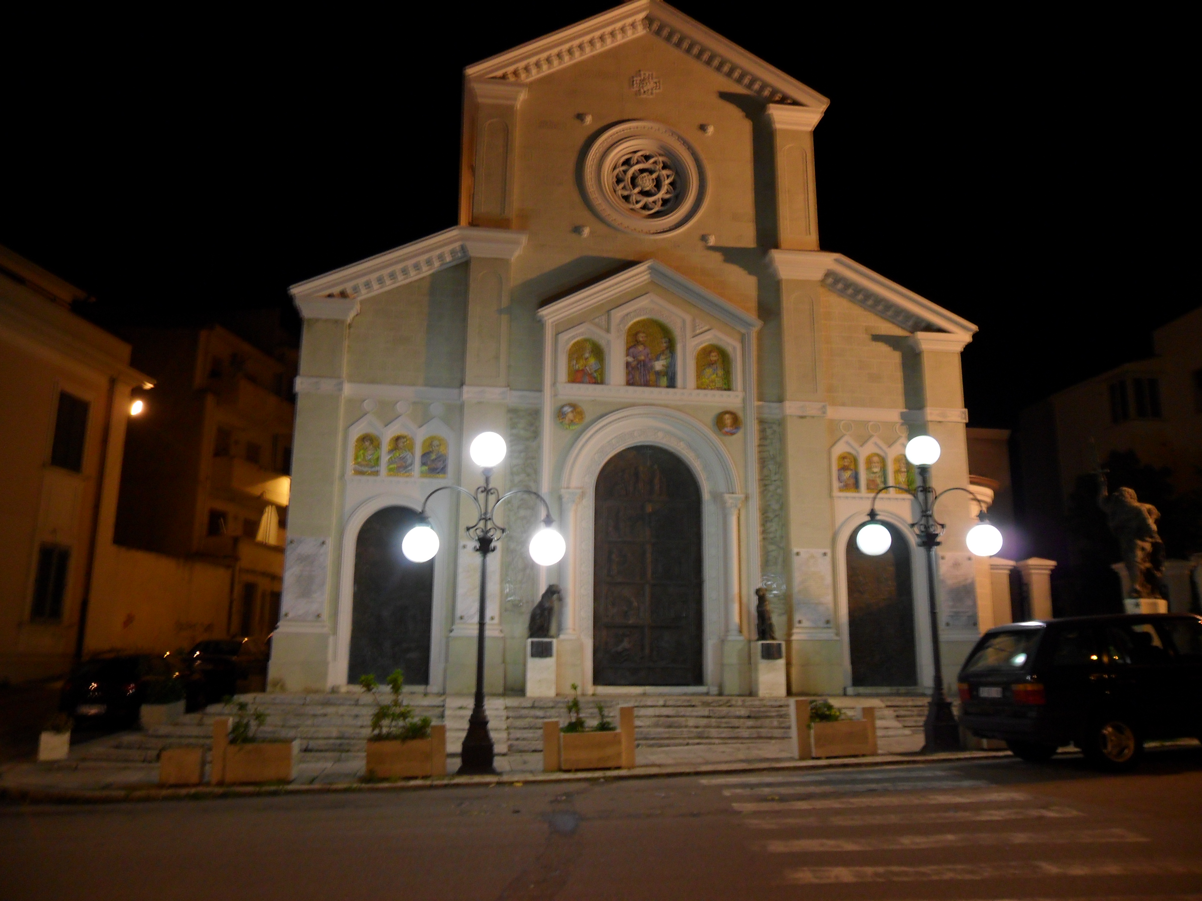 Facciata della chiesa di San Paolo di Reggio Calabria